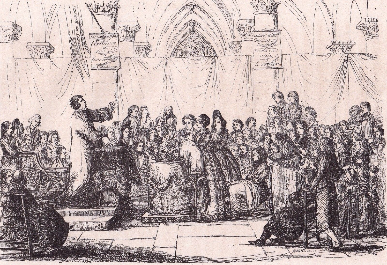 Un baptême sous le Directoire. Le culte naturel (théophilanthropes).